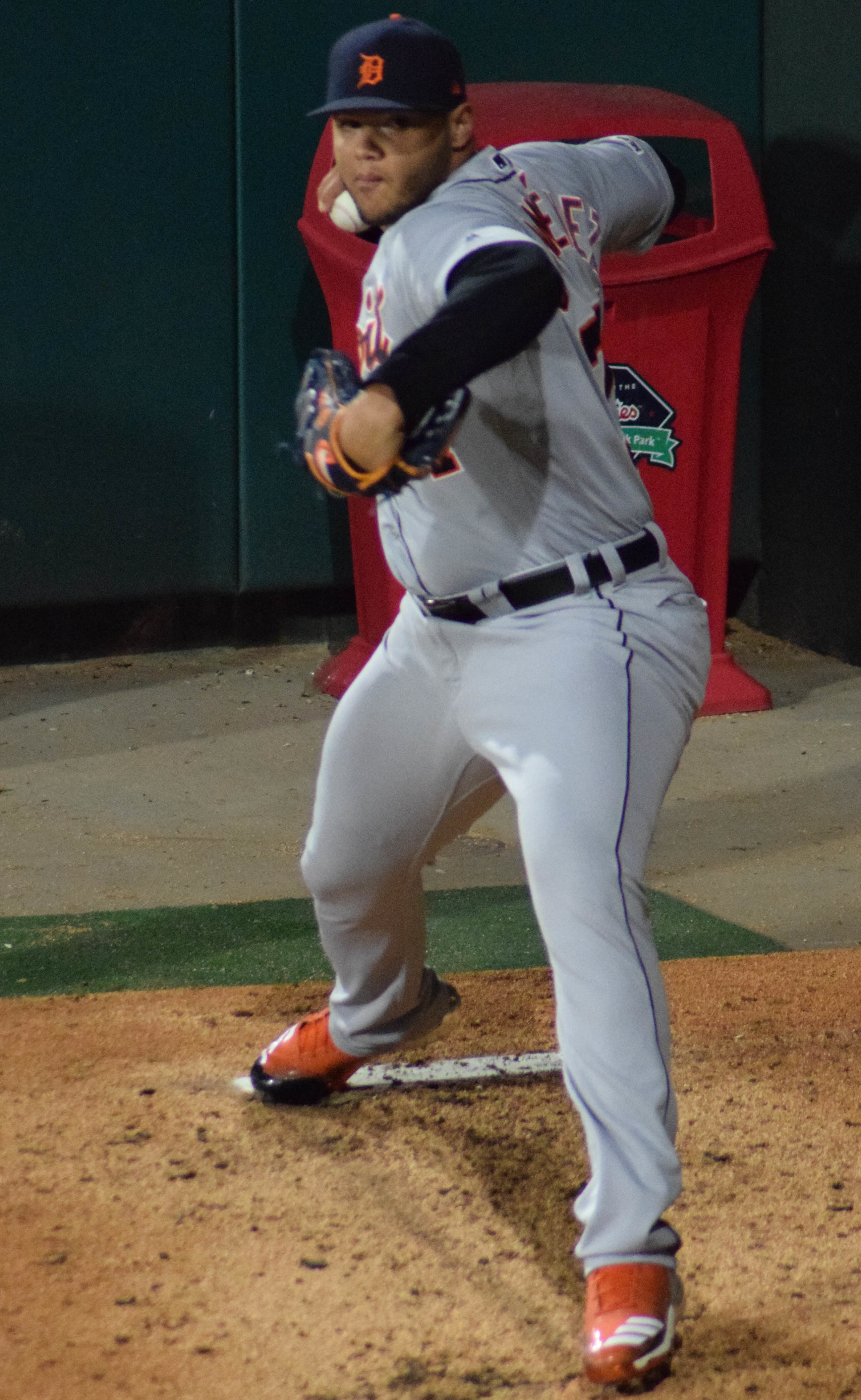 Joe Jiménez